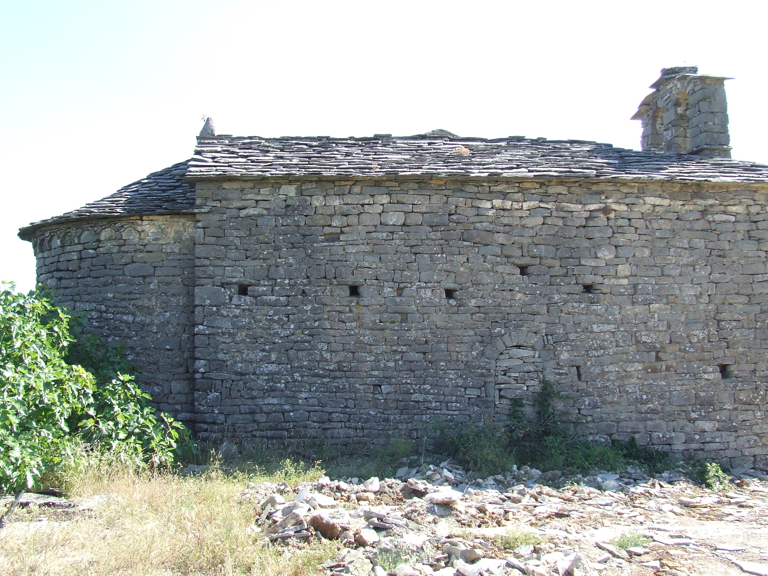 Mare de Déu d'Arbul (Fígols de Tremp, Tremp, Pallars Jussà)